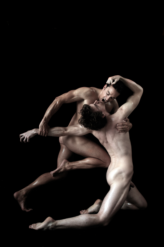 Martin Kámen Dante